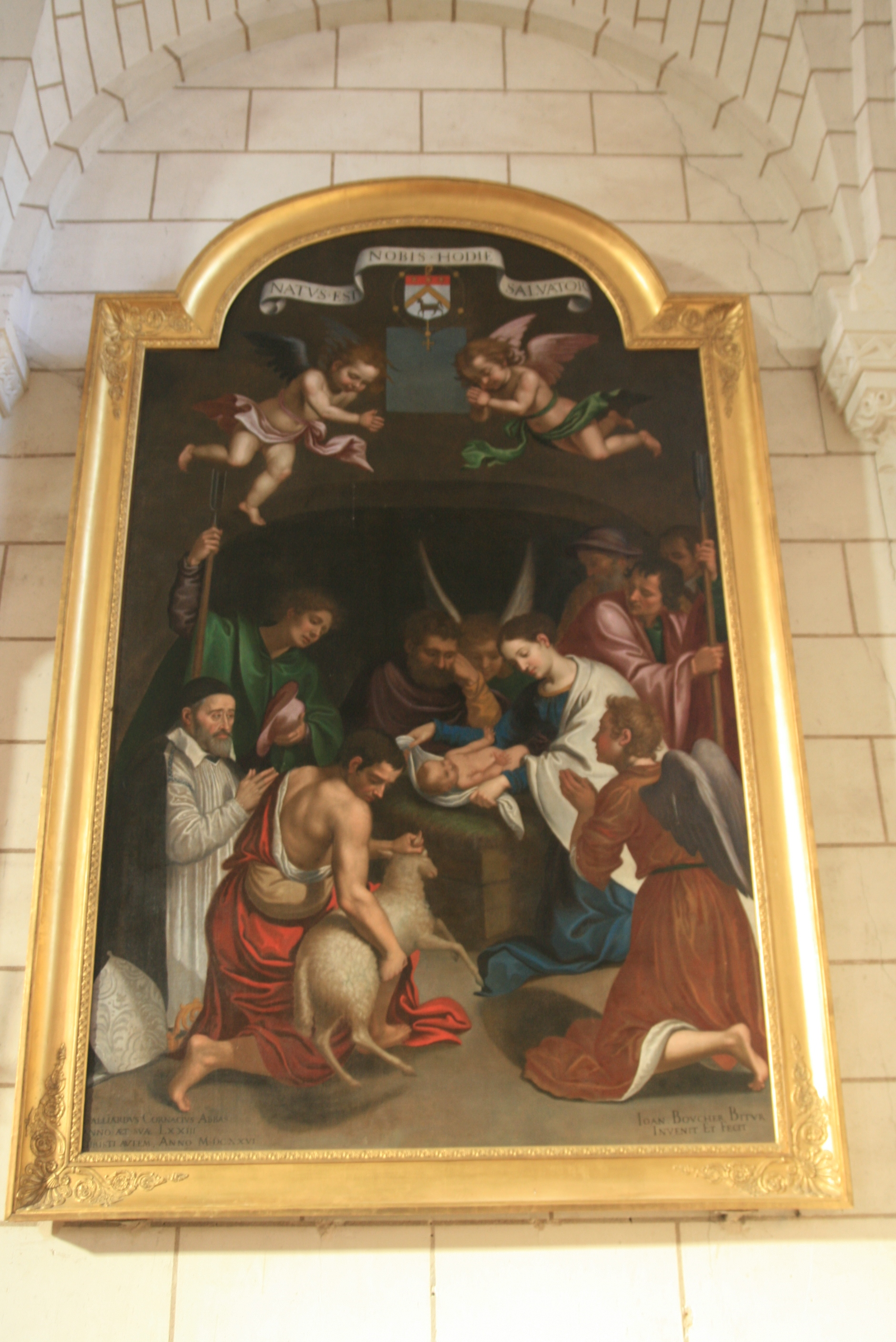 oeuvre de Jean Boucher qui date de 1626 : L'adoration des bergers. Cette oeuvre fait l'objet d'un classement au titre des monuments historiques depuis le 12 mars 1907.